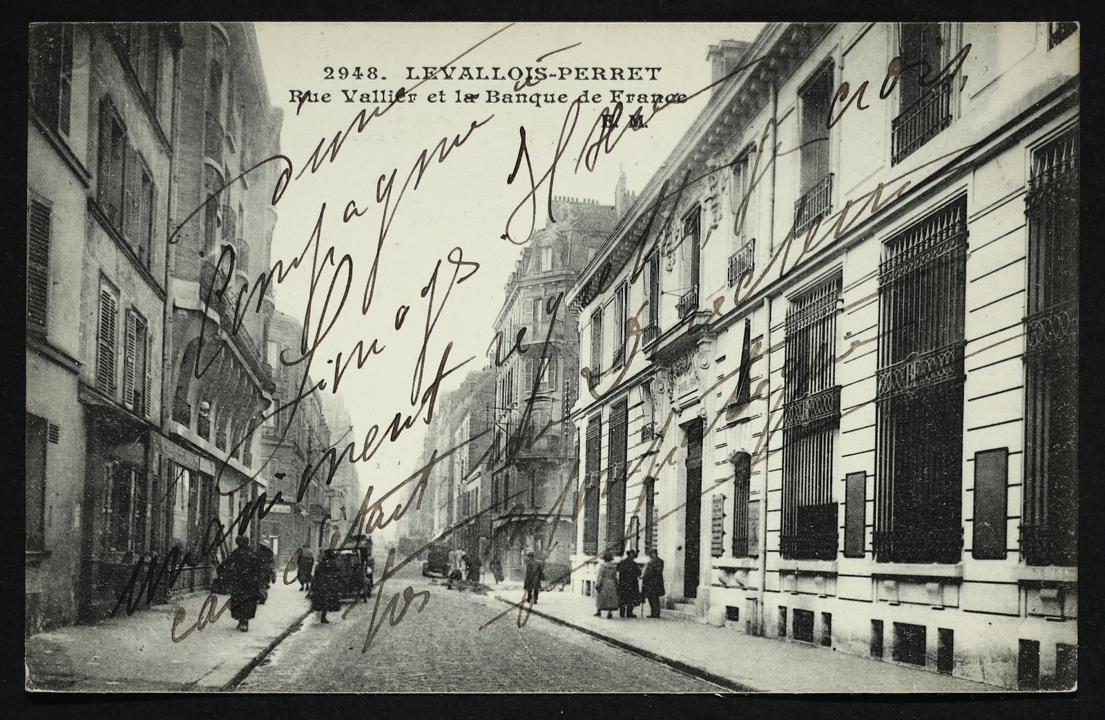 Levallois-Perret. Rue Vallier (plus tard renommée en rue Louise-Michel). Banque de France